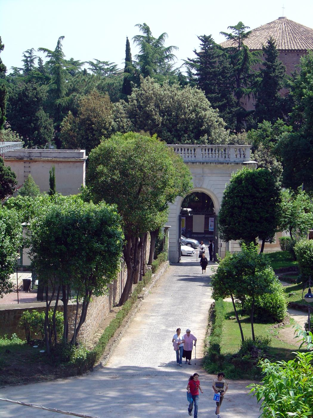 Ingresso di Villa Celimontana, Roma